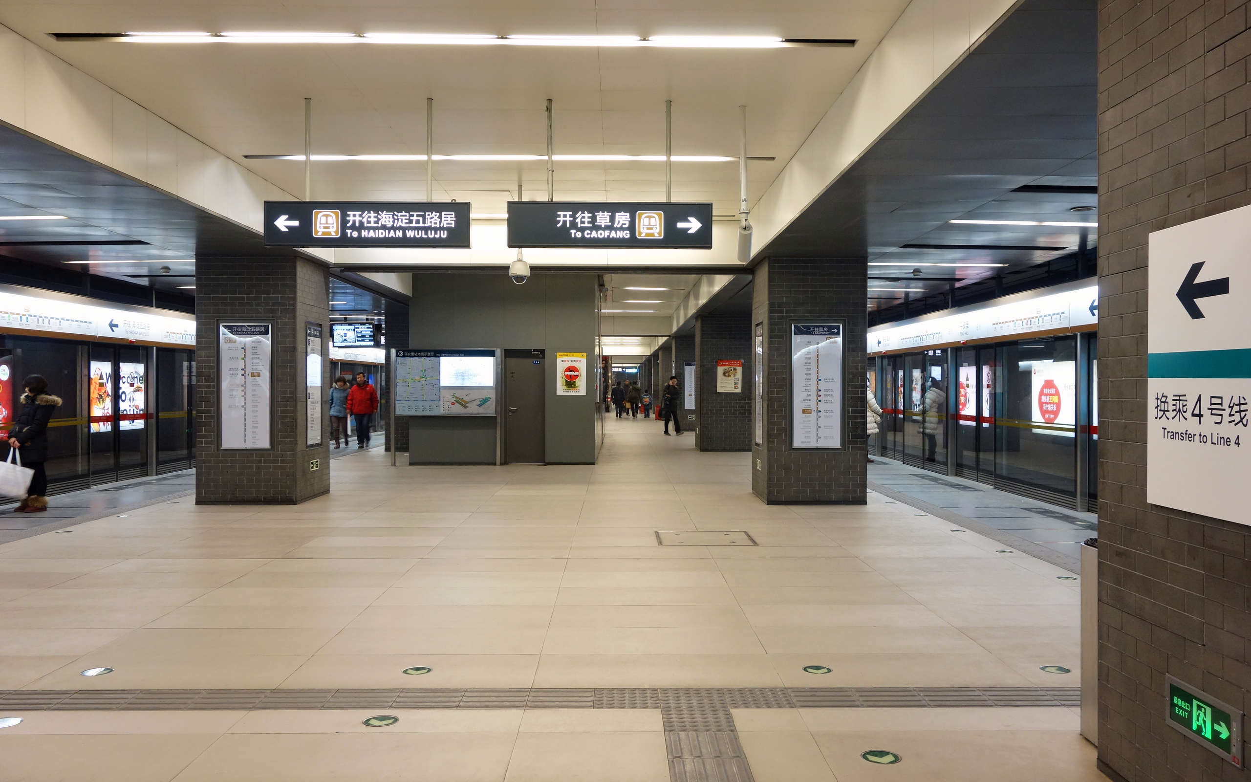 平安里站6号线岛式站台